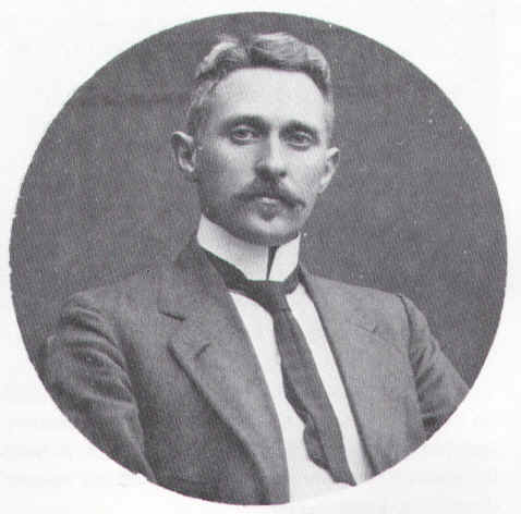 Portret van Cees Rienks de Boer. Foto.